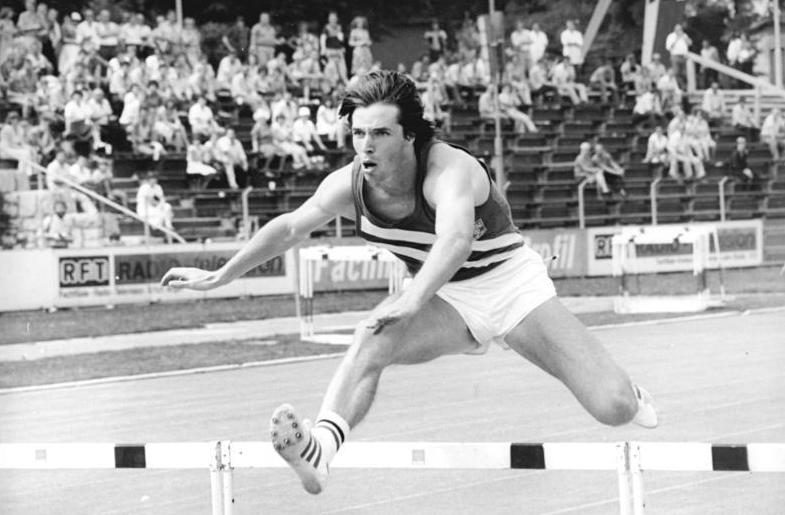 Volker Beck ADN-ZB Demme 2.8.81 Erfurt:DVfL-Sportfest-Sieger im Hürdenlauf- Auch am zweiten Tag des Sportfestes gab es eine Reihe bemerkenswerter Resultate. Über 400 m Hürden siegte Volker Beck vom SCTF in 49:38.